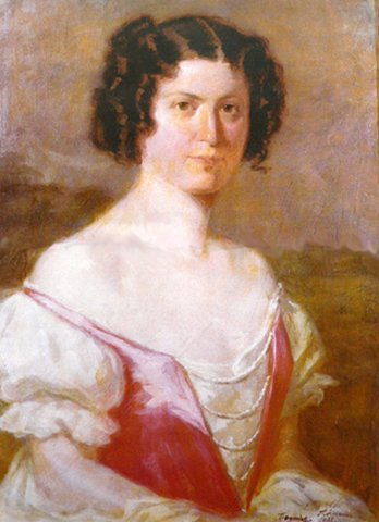 Countess Blanka Teleki (1806-1862)